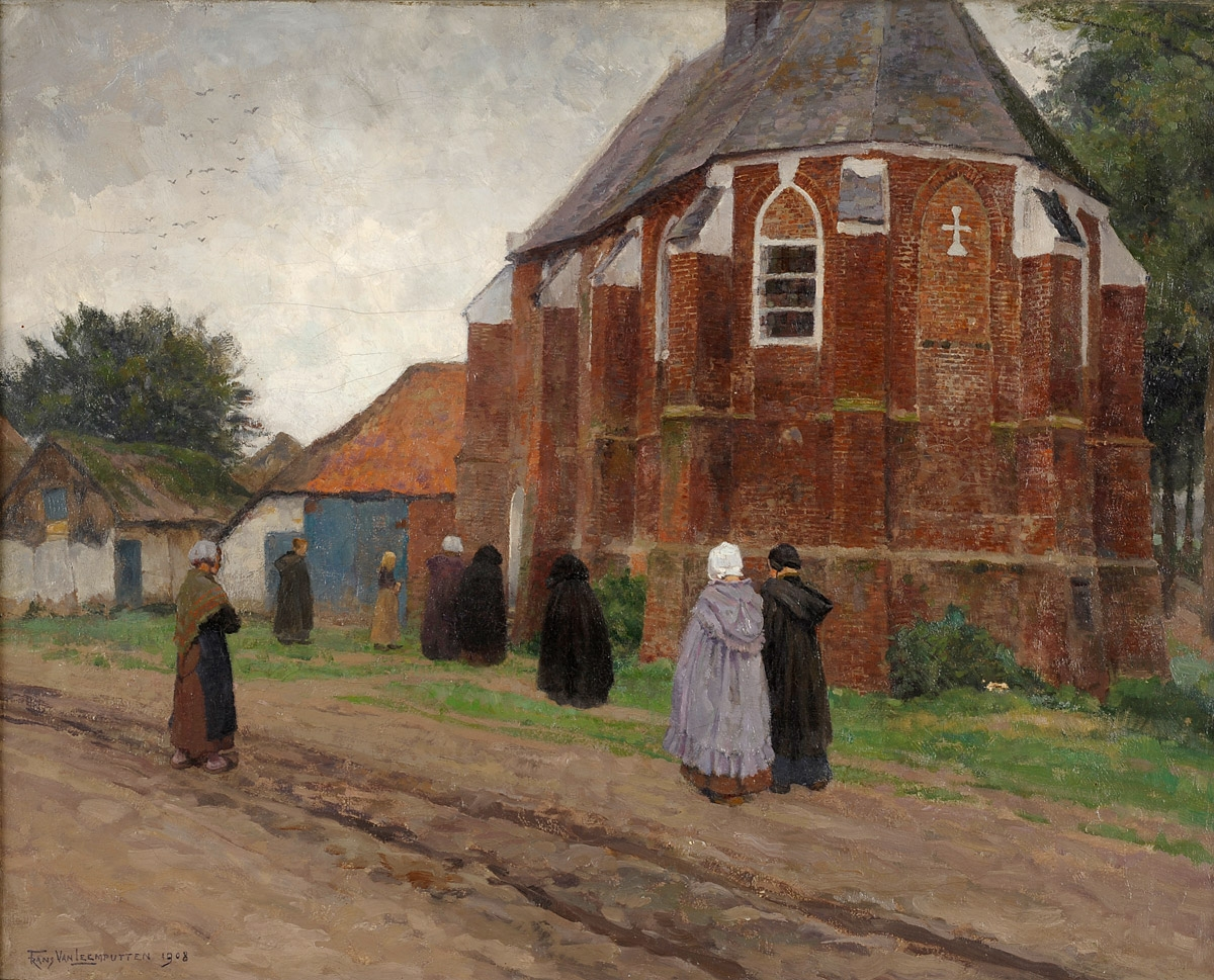 Der Kirchgang. Signiert. Datiert 1908. Öl/Lwd., 53 x 66 cm